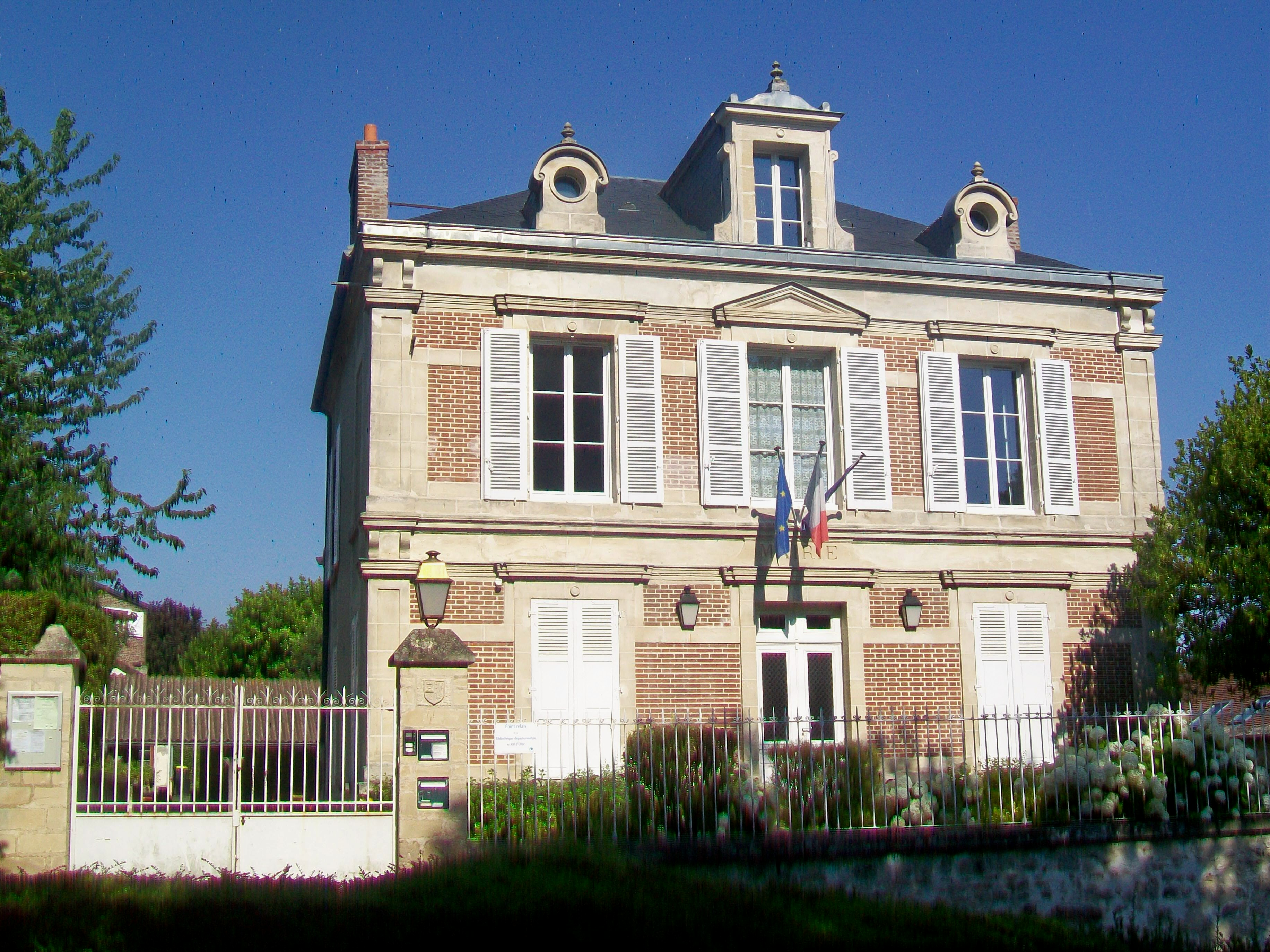 La mairie de Wy-dit-Joli-Village.